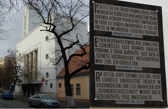 Emléktábla a kolozsvári Farkas utcai Egyetemiek Házán, az egykori kőszínház helyén